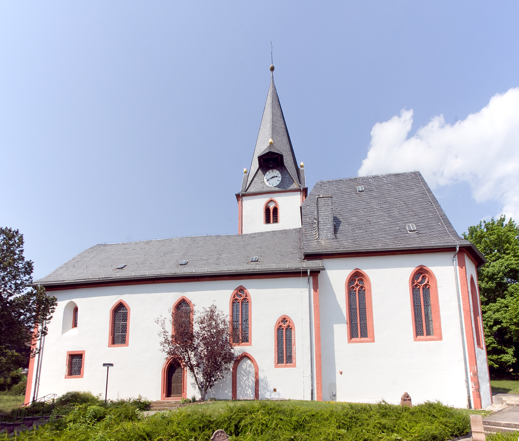 Evangelische Kirche in Dauernheim, Stadtteil von Ranstadt im Wetteraukreis, Deutschland.